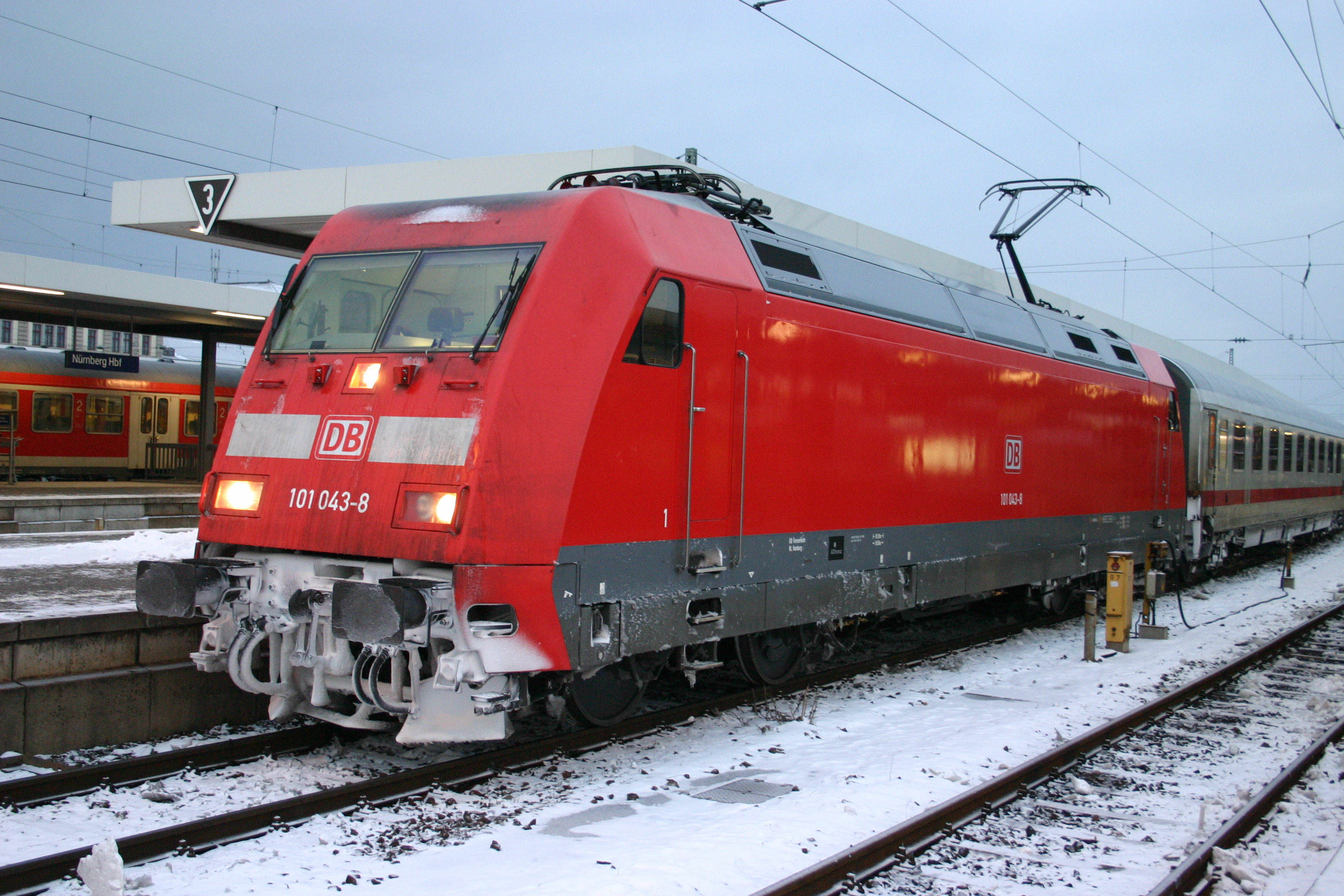 DB 101 in Nürnberg